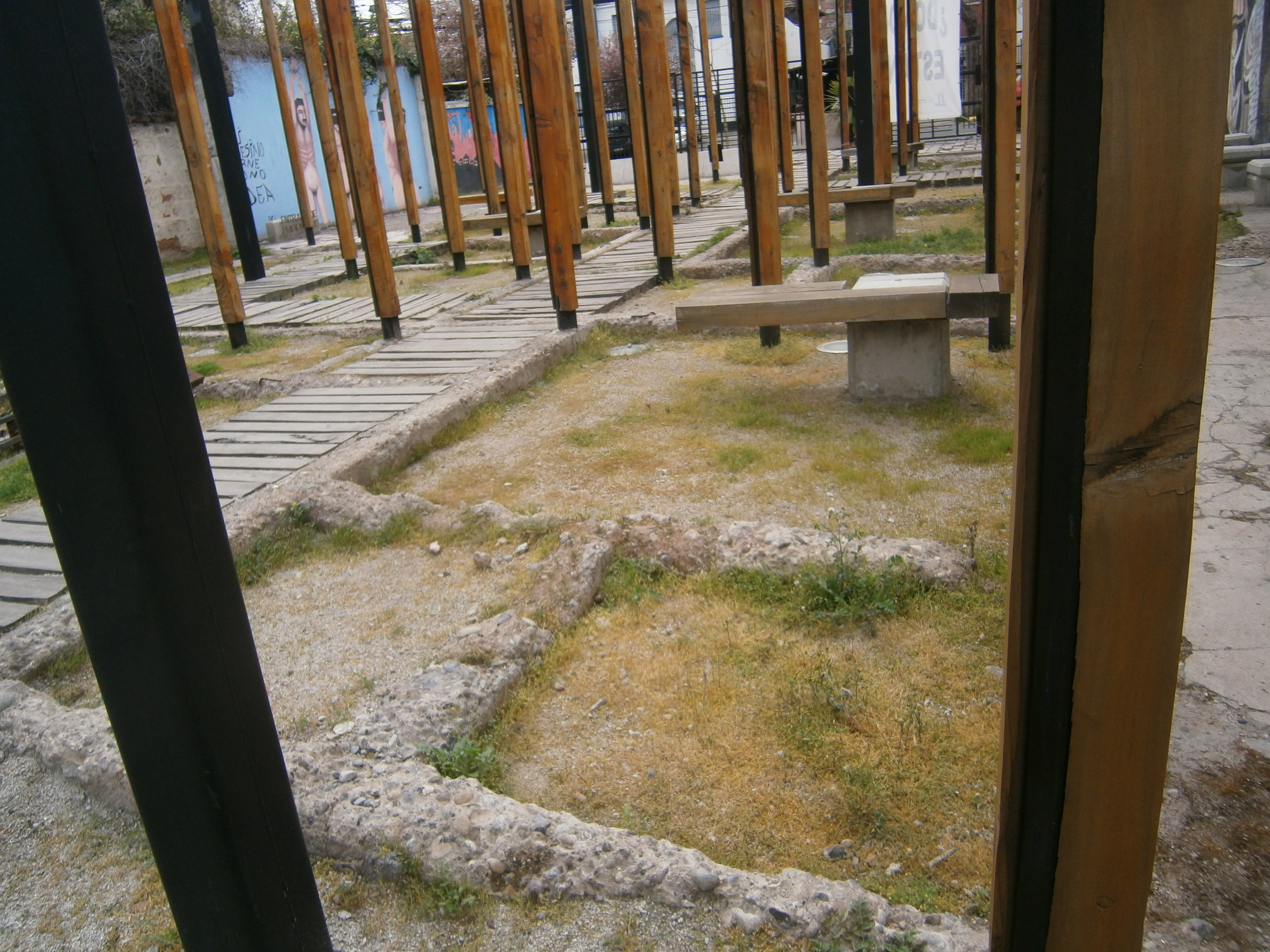 Sitio histórico ubicado en Av. José Domingo Cañas Nº 1367 This is a photo of a national monument in Chile: 481